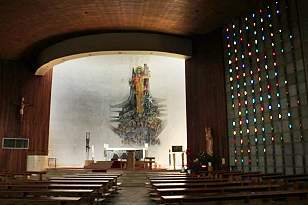 Zicht op het koor. Rechts de 'glas-in-beton'-constructie van kunstenaar Maurits Nevens.Daarnaast het beeld 'Onze-Lieve-Vrouw-met-Kind' van kunstenaar Willem De Backer. Het licht is sterk geconcentreerd op het hoogkoor. We zien het hardstenen altaar, ontwerp van W. De Backer, en de muurschildering van de triomferende Christus, werk van M. Nevens. Links de ronde ambo.